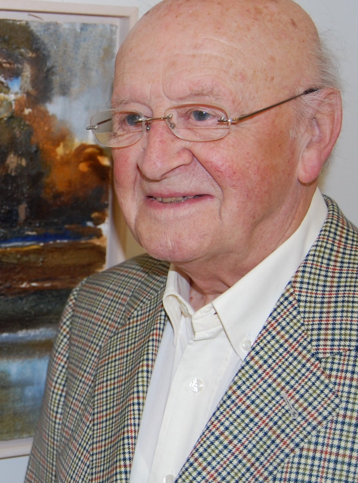 Emil Waldmann (* 1925), deutscher Maler und Grafiker